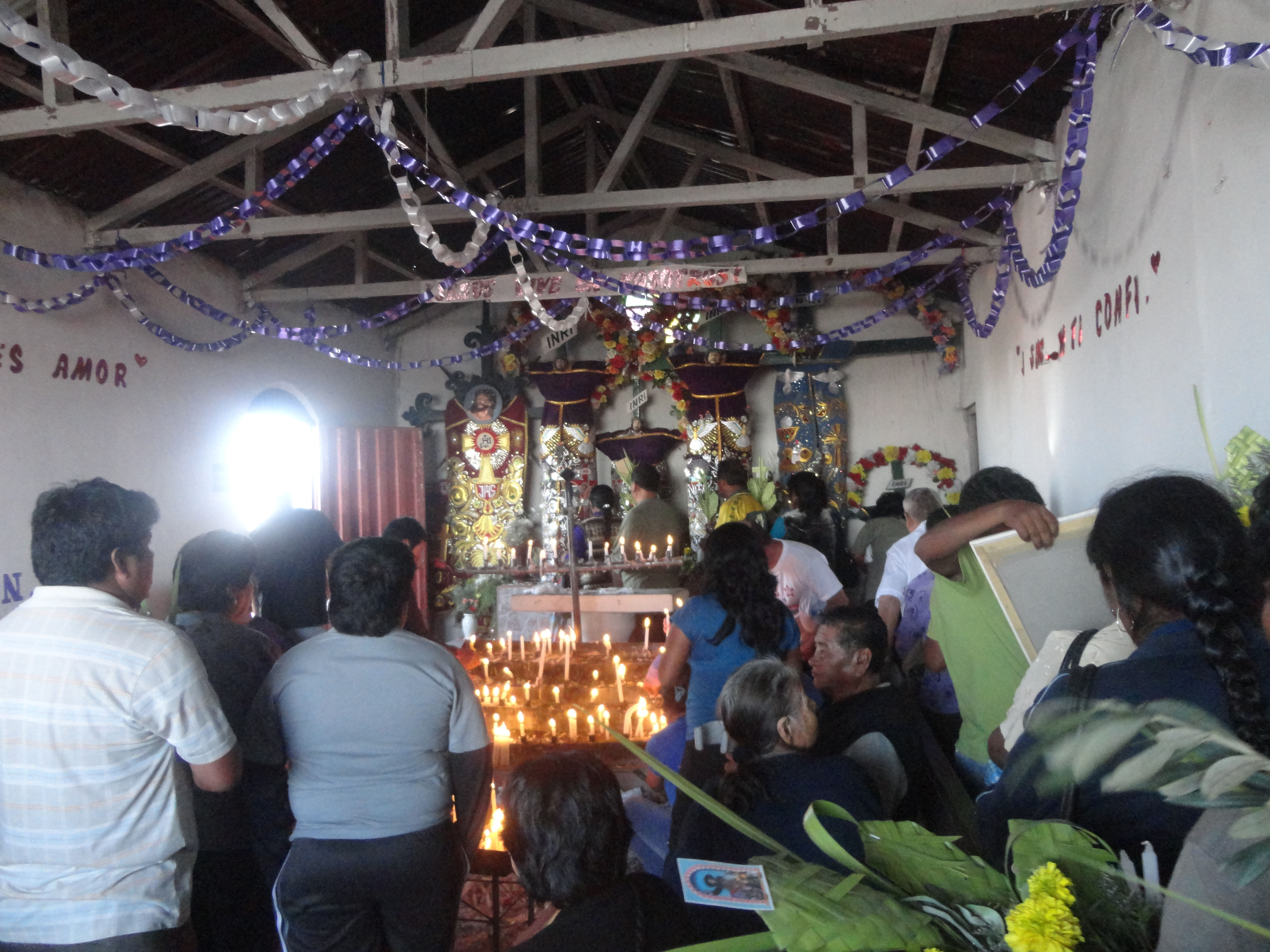 viernes santo